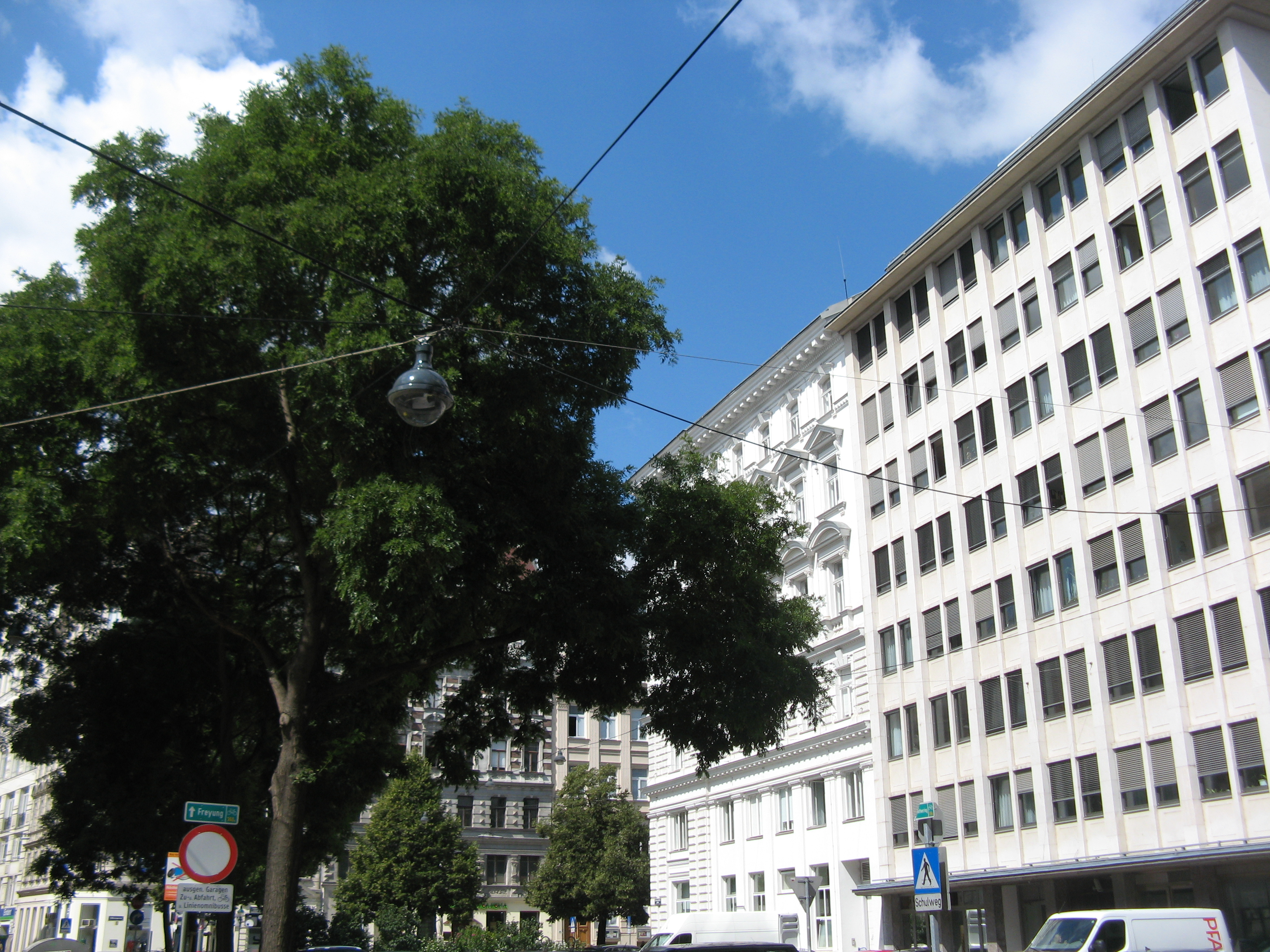 Concordiaplatz, Wien-Innere Stadt